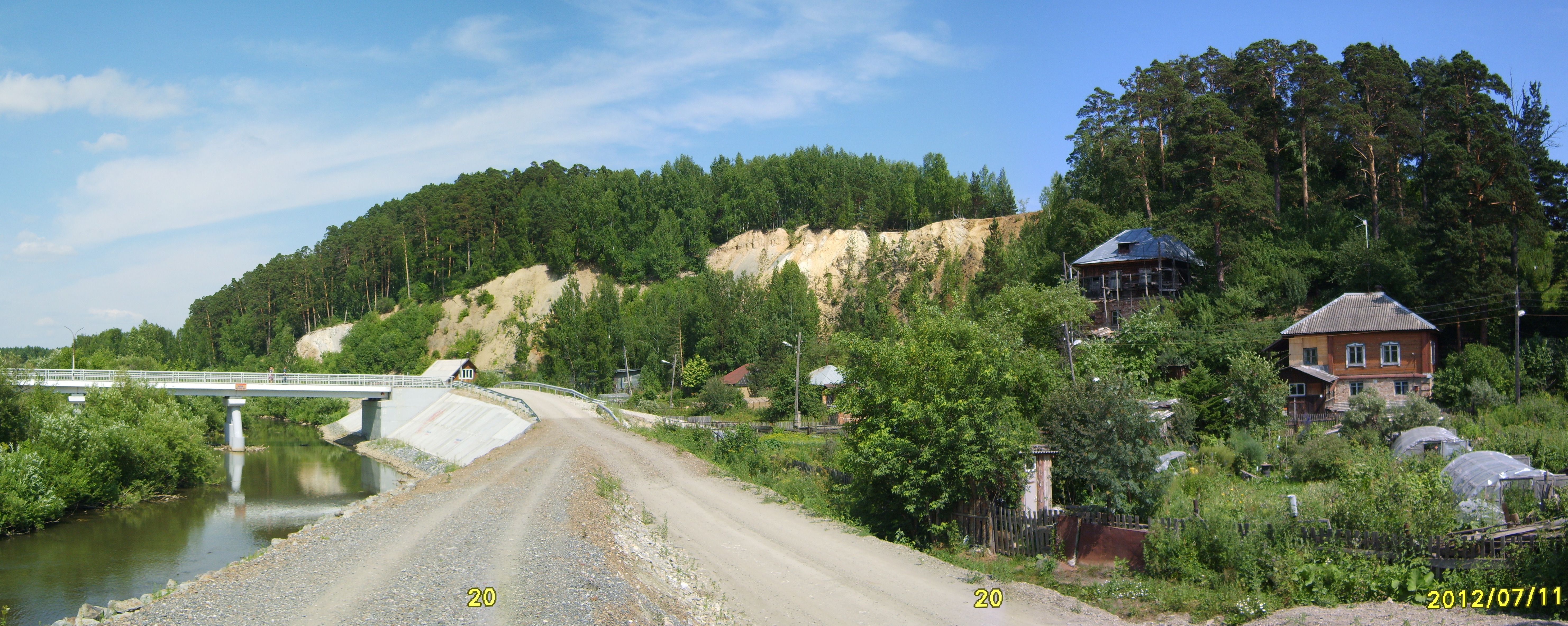 Степановка